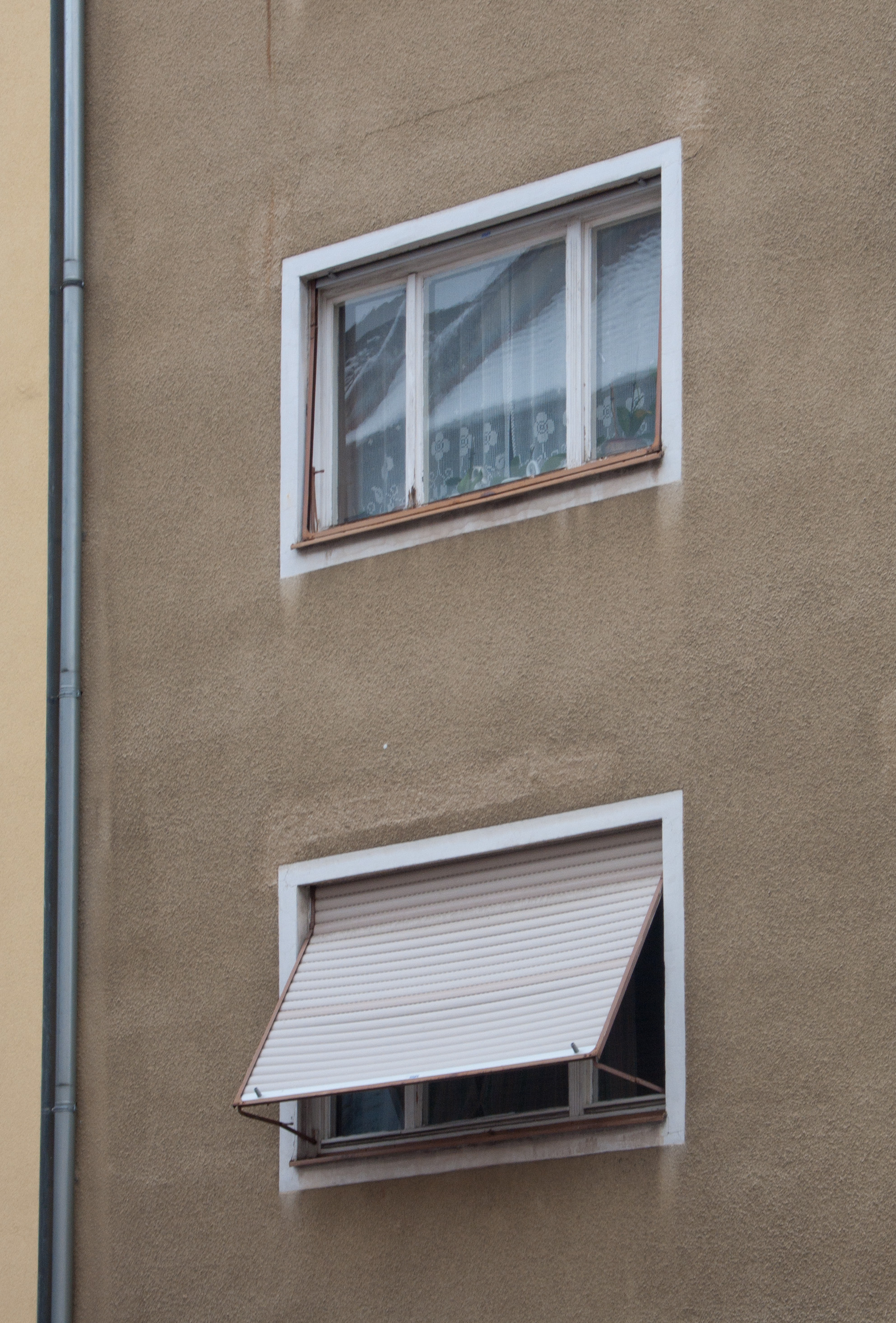 Nürnberg, Gmkg. Gleißhammer, Bleiweiß. Wohnhaus Nibelungenstr. 9.